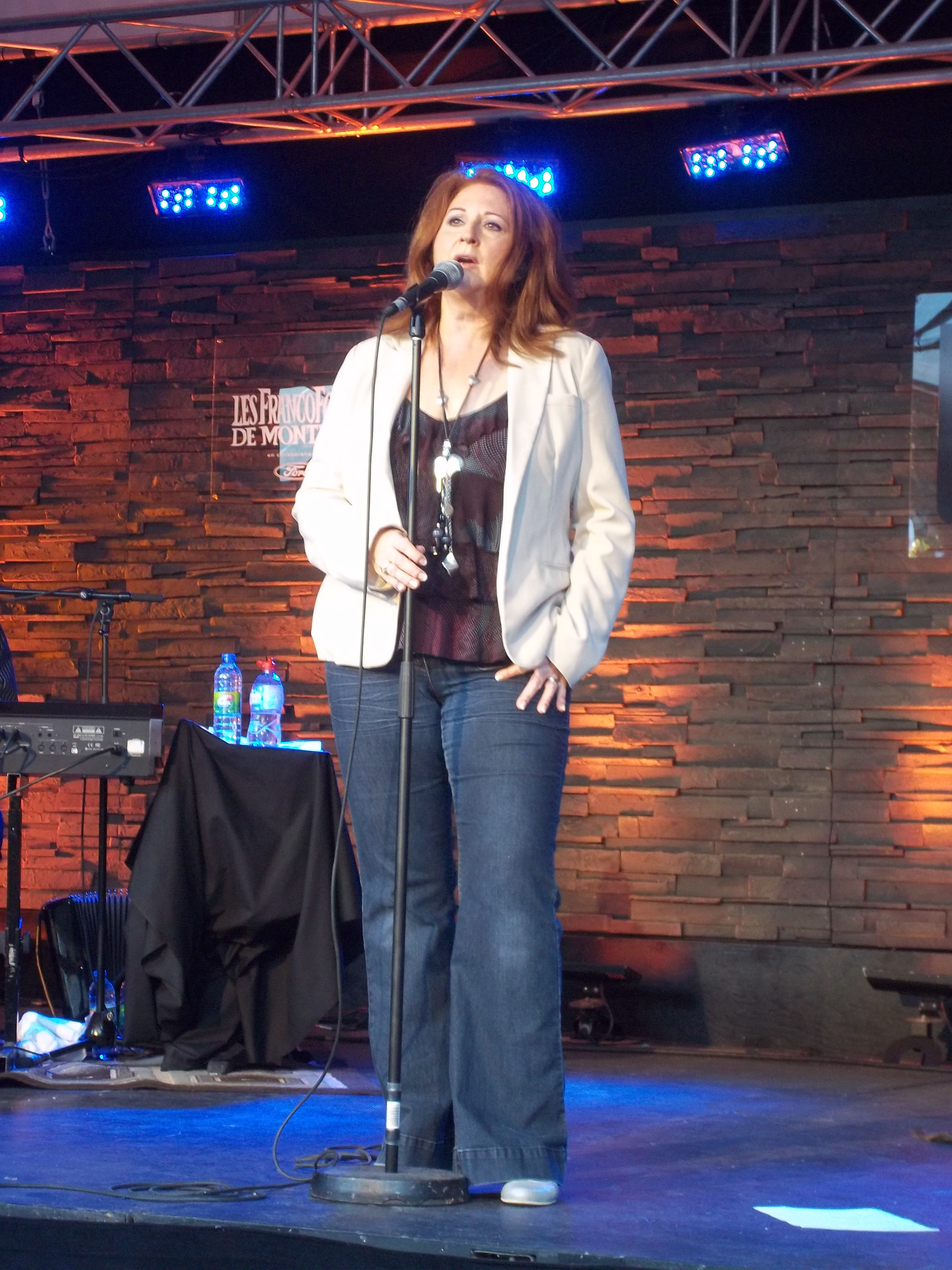 Spectacle de Laurence Jalbert dans le cadre des FrancoFolies de Montréal le 16 juin 2012